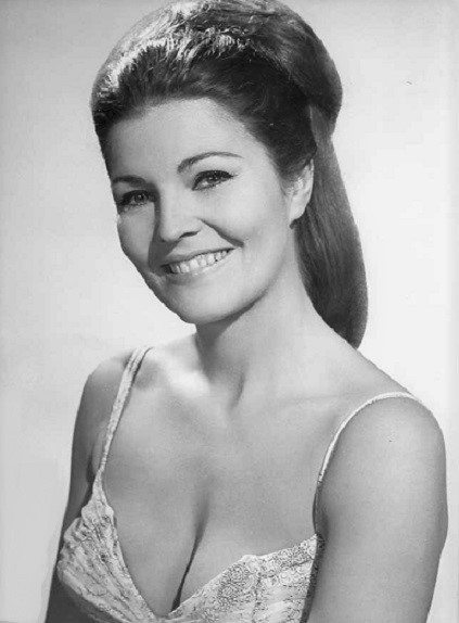 Claire Kelly, foto pubblicitaria